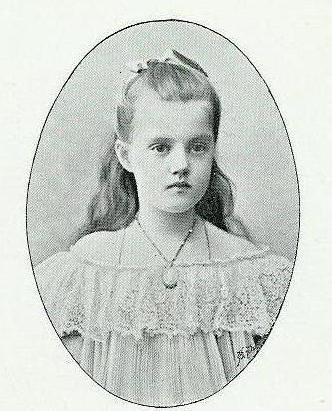 Fotografia w.ks. Marii Pawłownej Romanowej z roku 1900